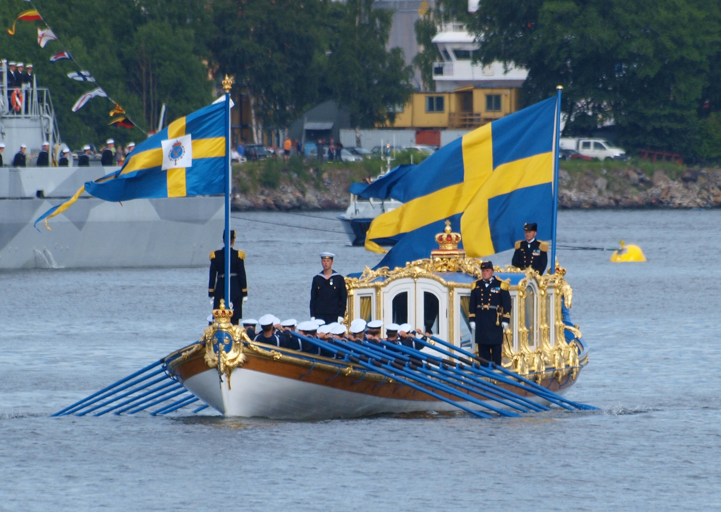 Bröllopet mellan Victoria och Daniel. Vasaorden.